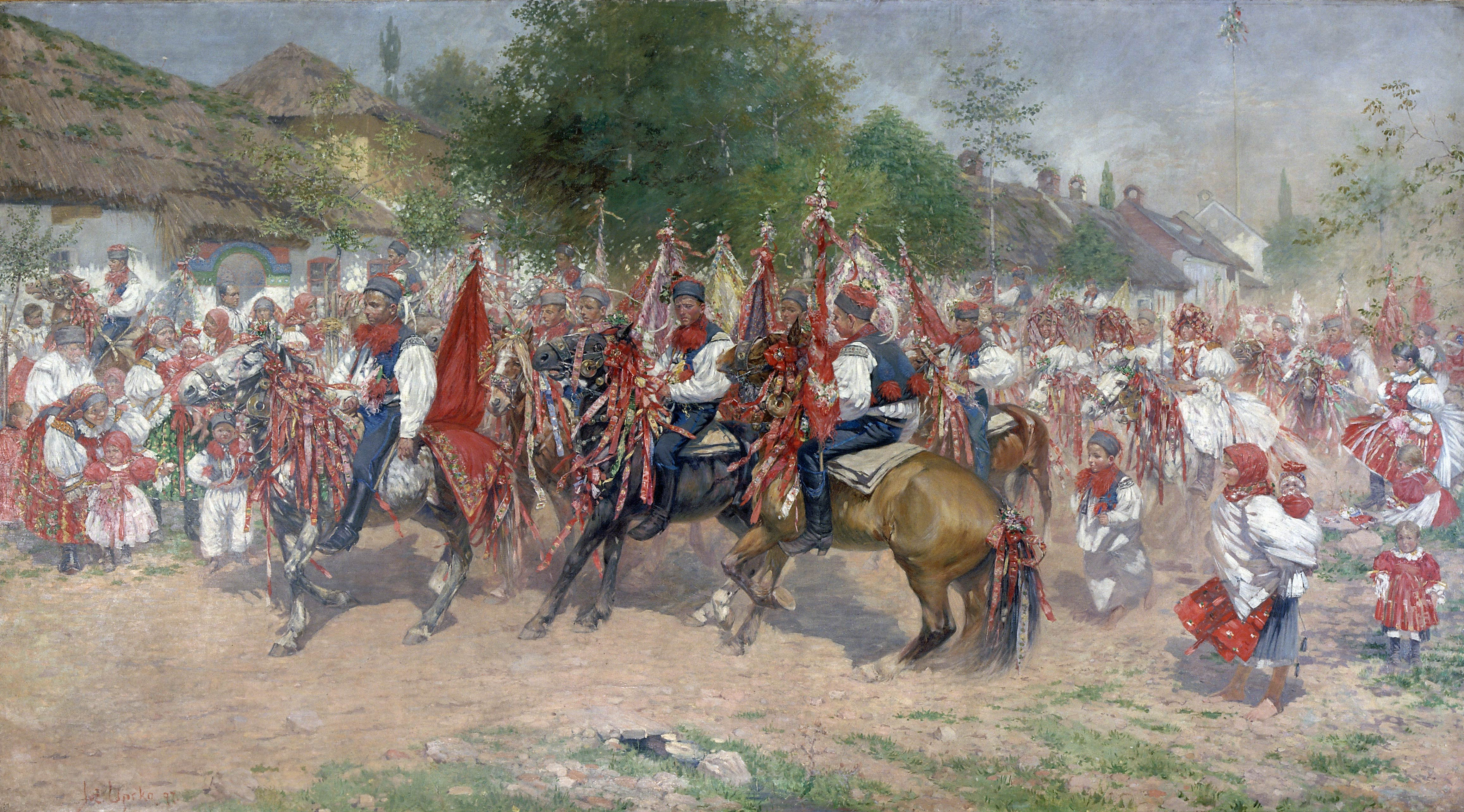 Езда королей